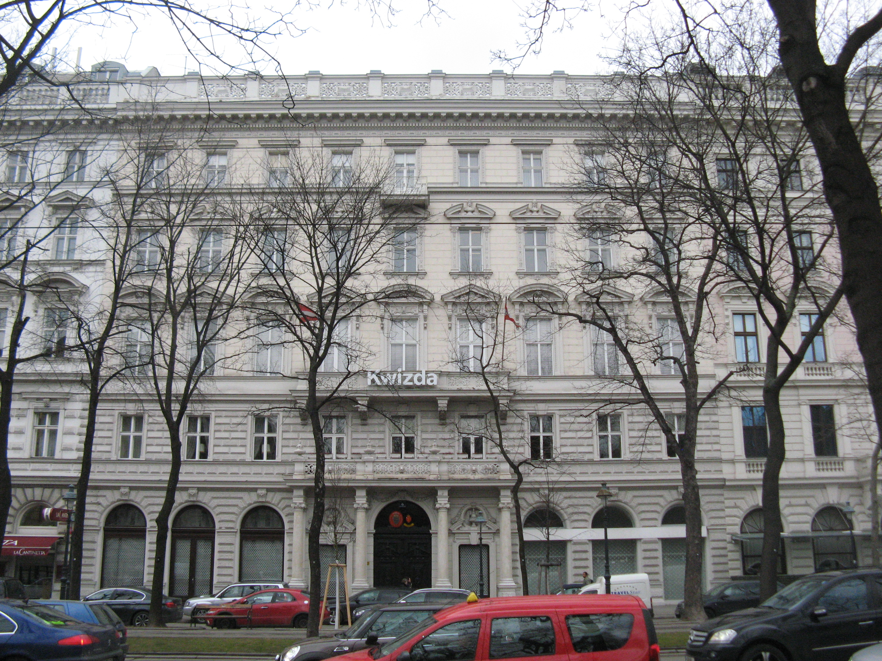 Haus Dr.-Karl-Lueger-Ring 6 (1873-1874) von Ludwig Tischler und Carl Schumann, Wien-Innere Stadt